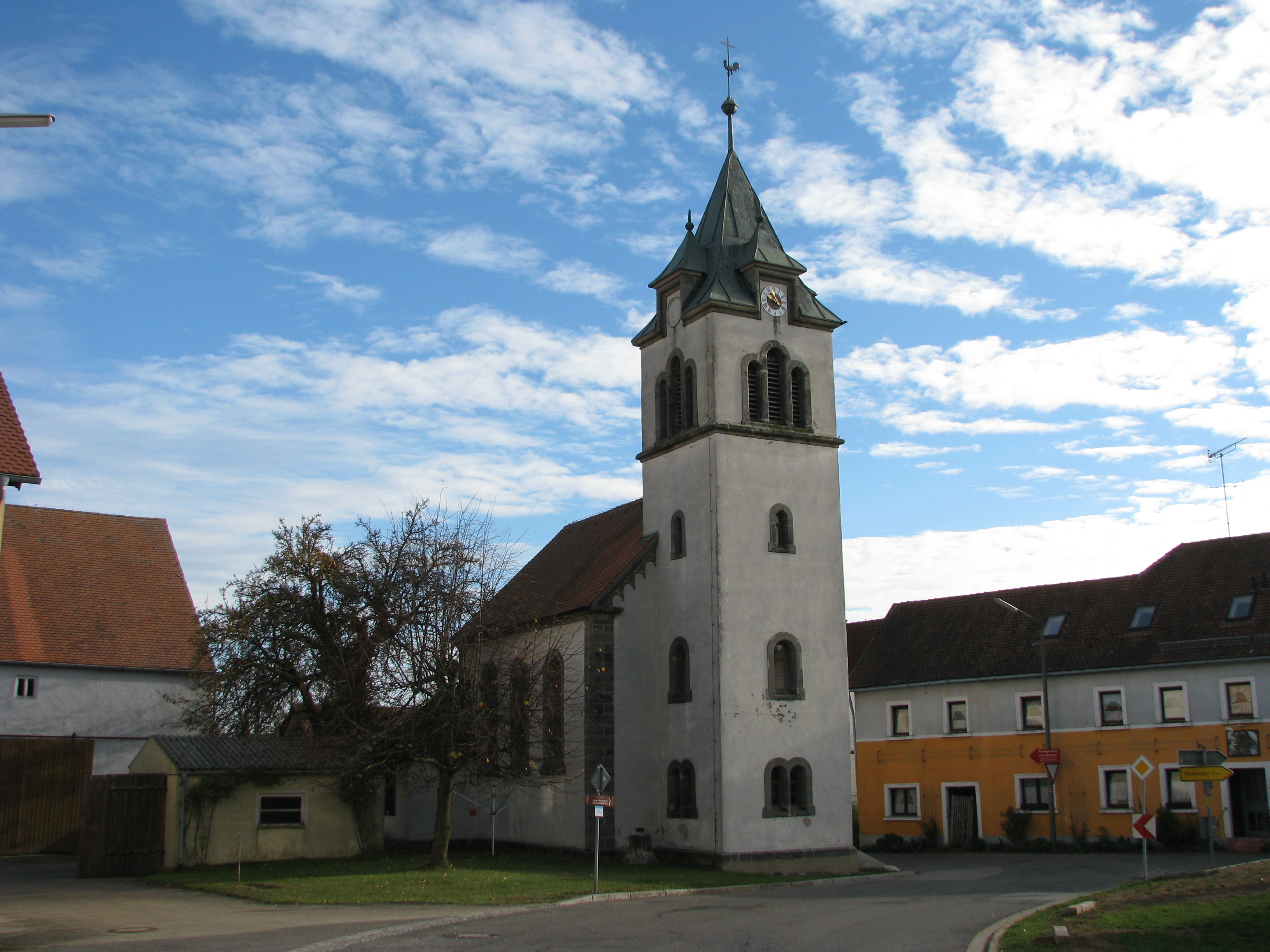 Ruppmannsburg, Ortsteil von Thalmässing im mittelfränkischen Landkreis Roth